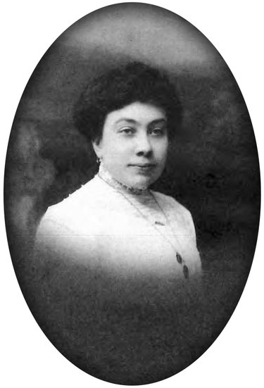 Katalina Eleizegi Maiz antzerki idazle donostiarraren argazkia